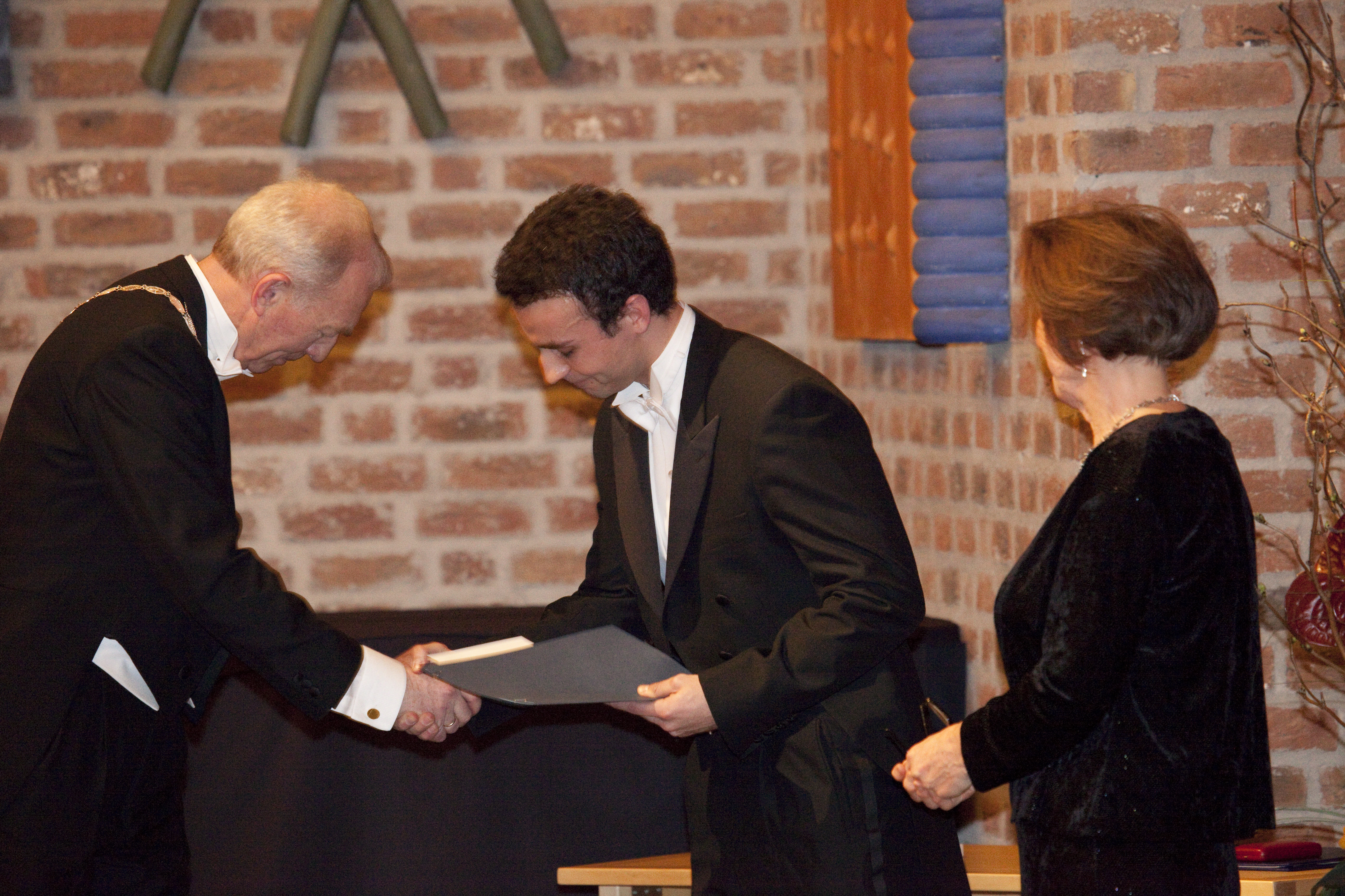 Fung. preses Kristian Fossheim, Jacob Linder og klasseleder Hanna Mustaparta. Jacob Linder fikk Det Kongelige Norske Videnskabers Selskabs pris til yngre forskere innen naturvitenskap, finansiert av I. K. Lykkes fond. Foto: Bruce Sampson / NTNU Vitenskapsmuseet.